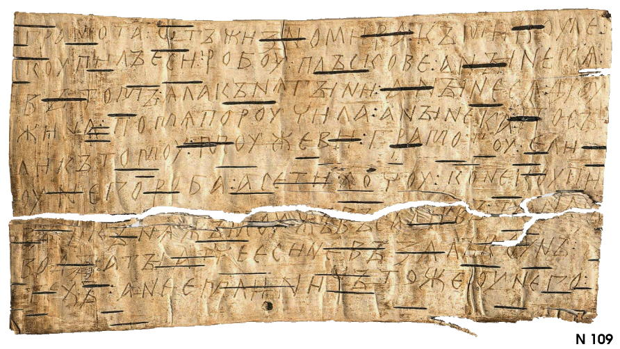 The letter on the birch bark N 109 from ancient Novgorod (Russia). Содержание: Грамота от Жизномира к Микуле. Ты купил рабыню во Пскове, и вот меня за это схватила [подразумевается: уличая в краже] княгиня. А потом за меня поручилась дружина. Так что пошли-ка к тому мужу грамоту, если рабыня у него. А я вот хочу, коней купив и посадив [на коня] княжеского мужа, [идти] на своды [очные ставки]. А ты, если [еще] не взял тех денег, не бери у него ничего.